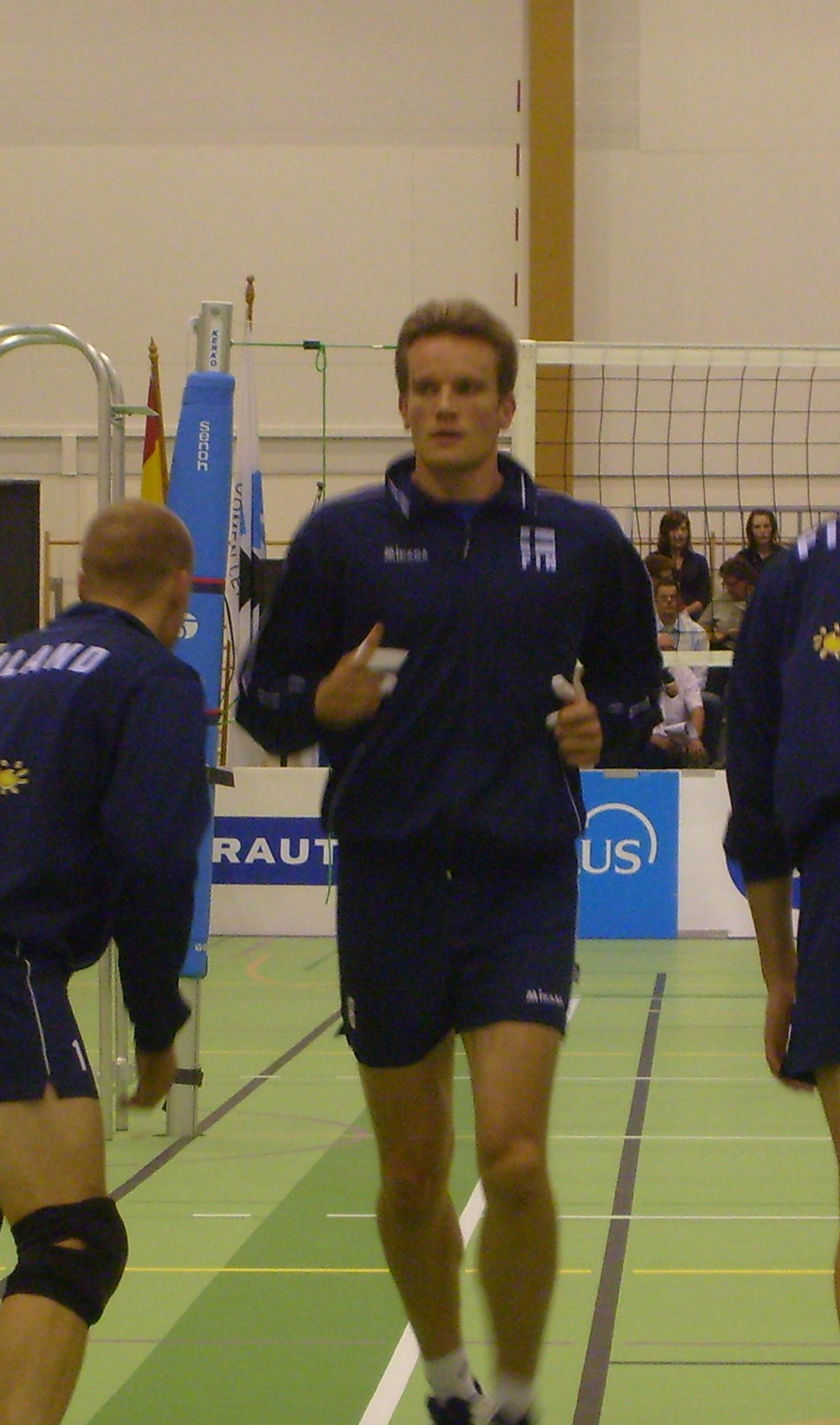 Maajoukkuekapteeni Tuomas Sammelvuo, 31. elokuuta 2007 pelatussa A-maaottelussa Espanjaa vastaan, Laihialla